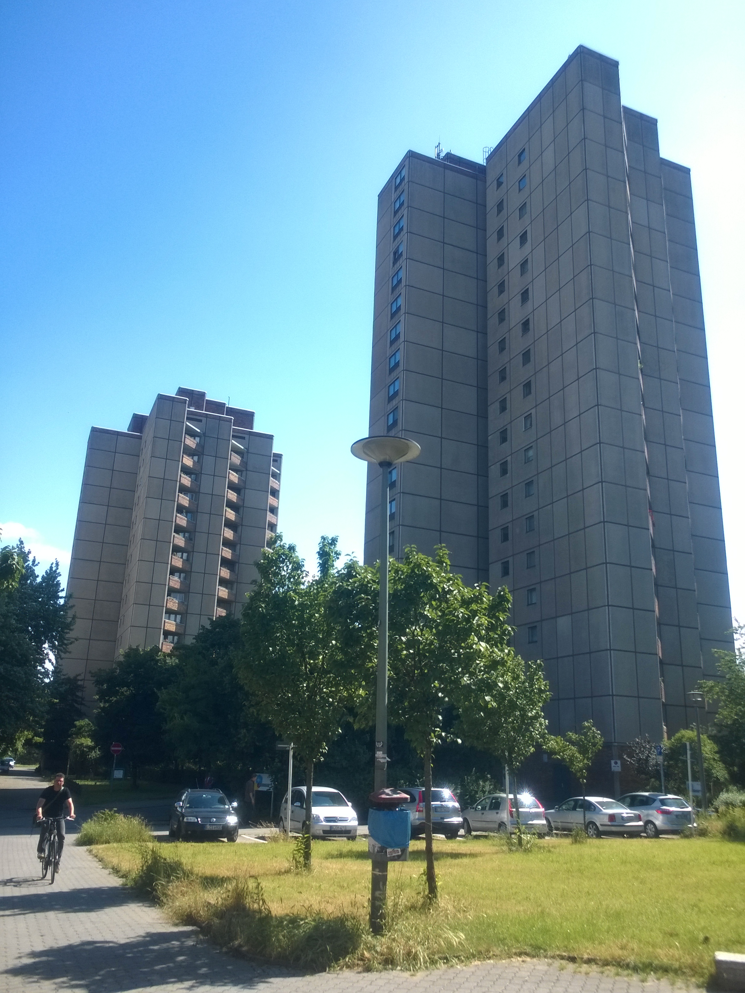 Berlin-Prenzlauer Berg Ernst-Thälmann-Park Hochhäuser